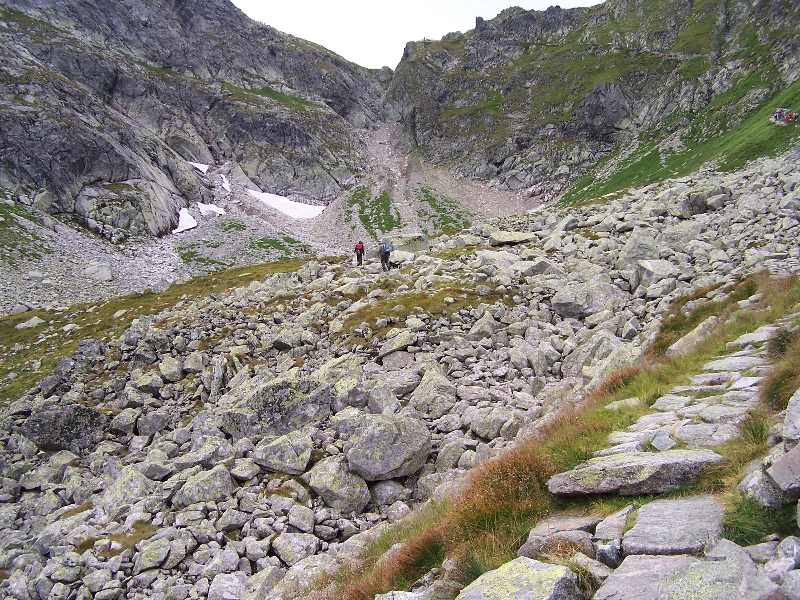 Świnicka Kotlinka (Tatra Mountains, Dolina Gąsienicowa